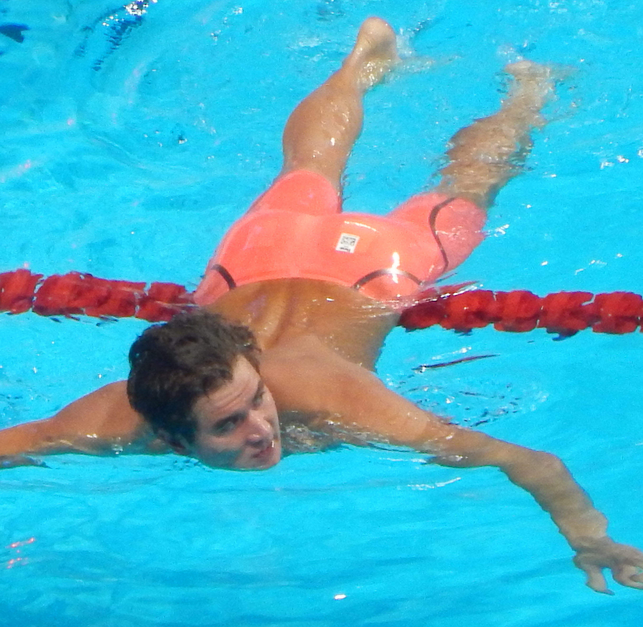 Натан Эдриан после финиша эстафеты